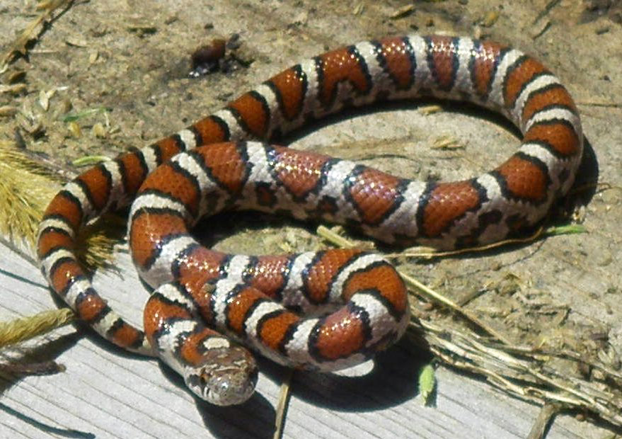 Lampropeltis triangulum triangulum (Eastern Milksnake)